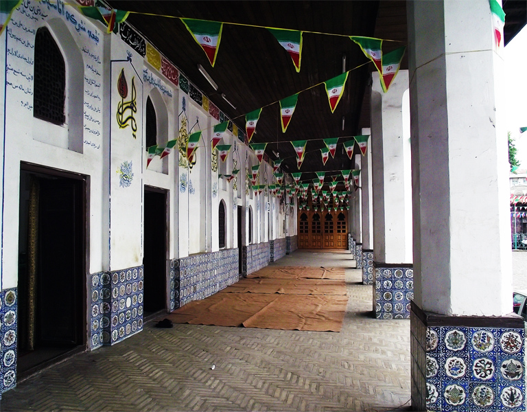 نمایی از ورودی‌های بقاع مسجد چهار پادشاه